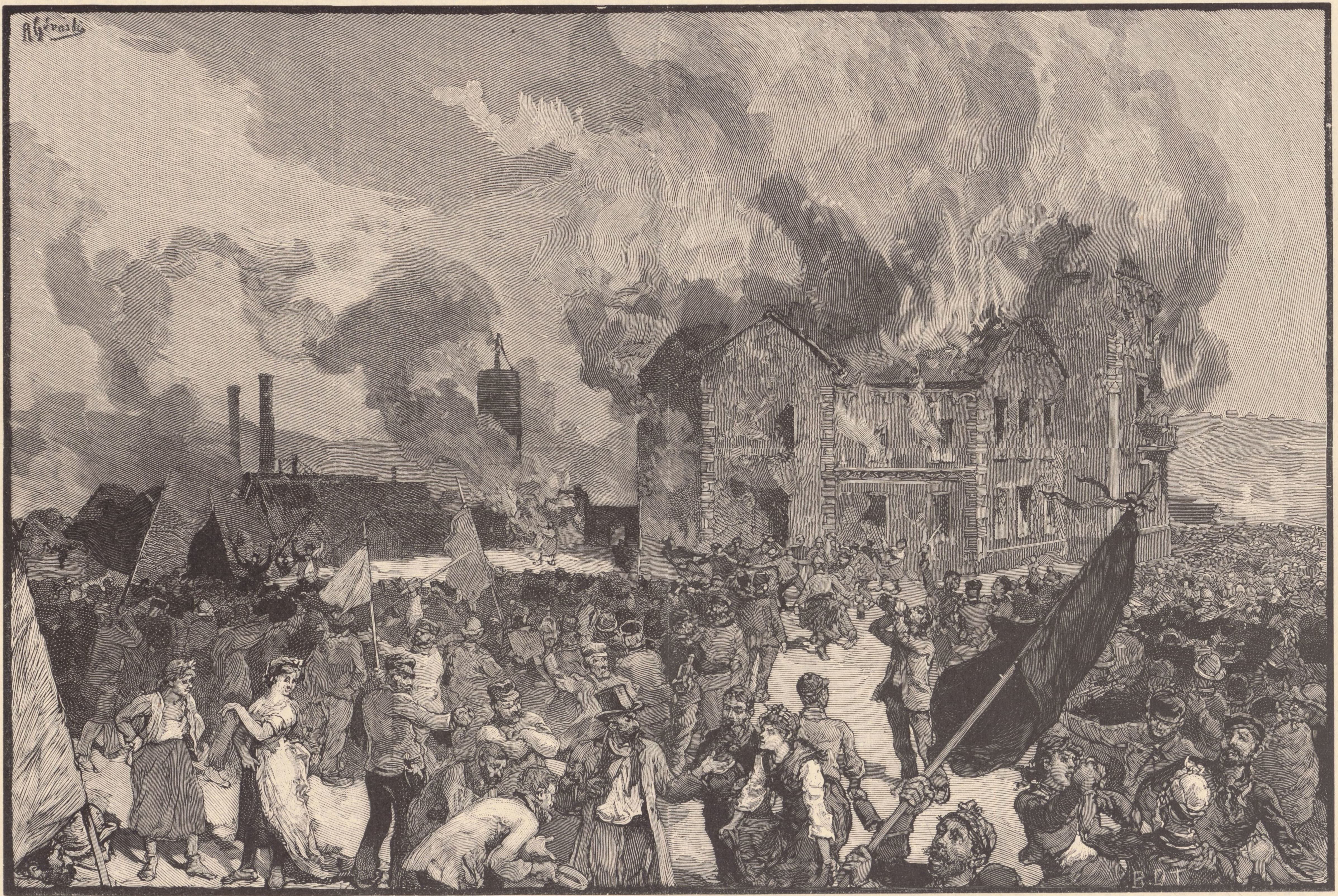 Jumet - L'incendie et le pillage de la verrerie et du château de M. Baudoux. (Dessin de M. Gérardin, d'après le croquis de M. Dick).